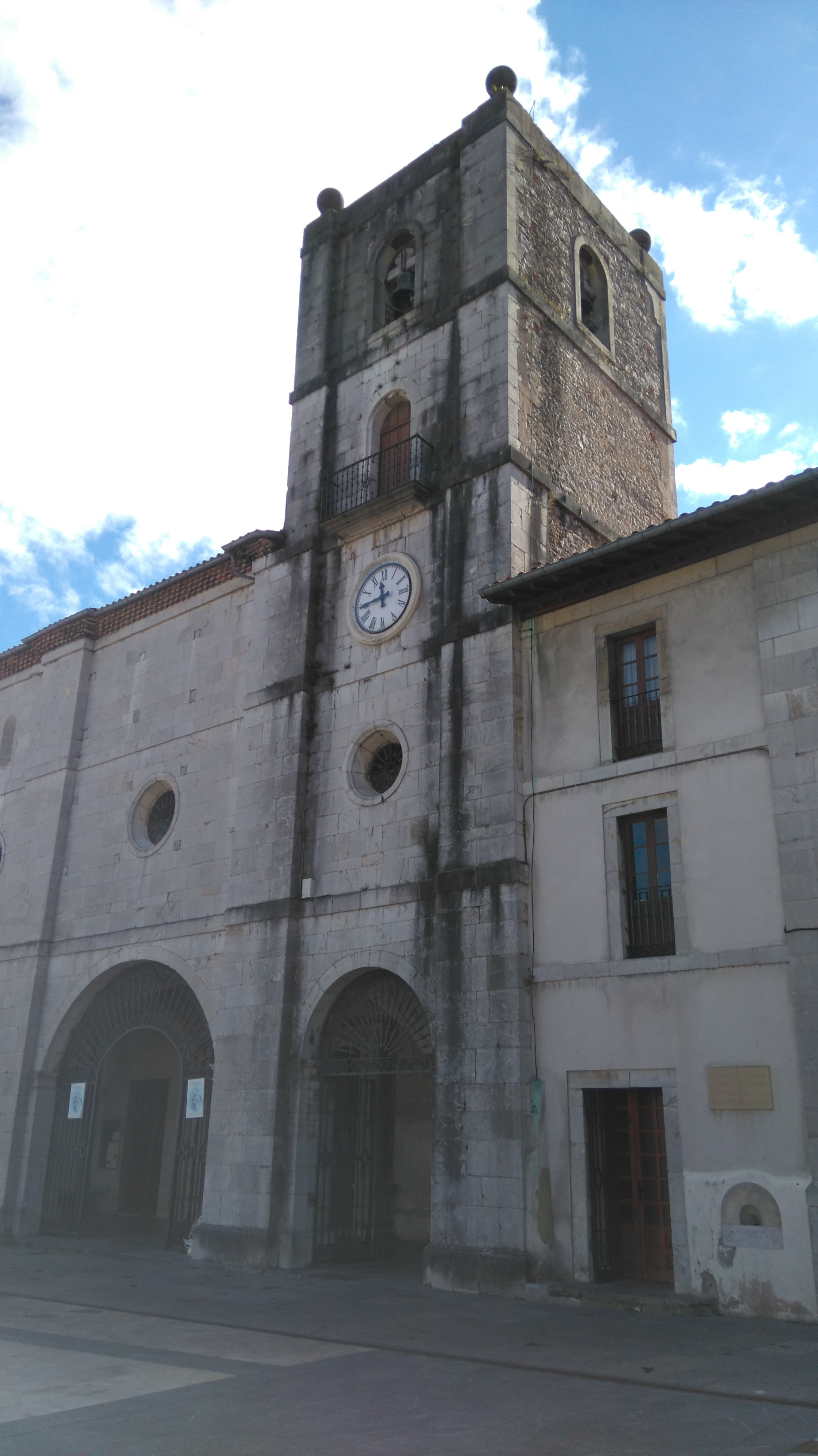 Colegiata de Santa María en Pravia, Asturias